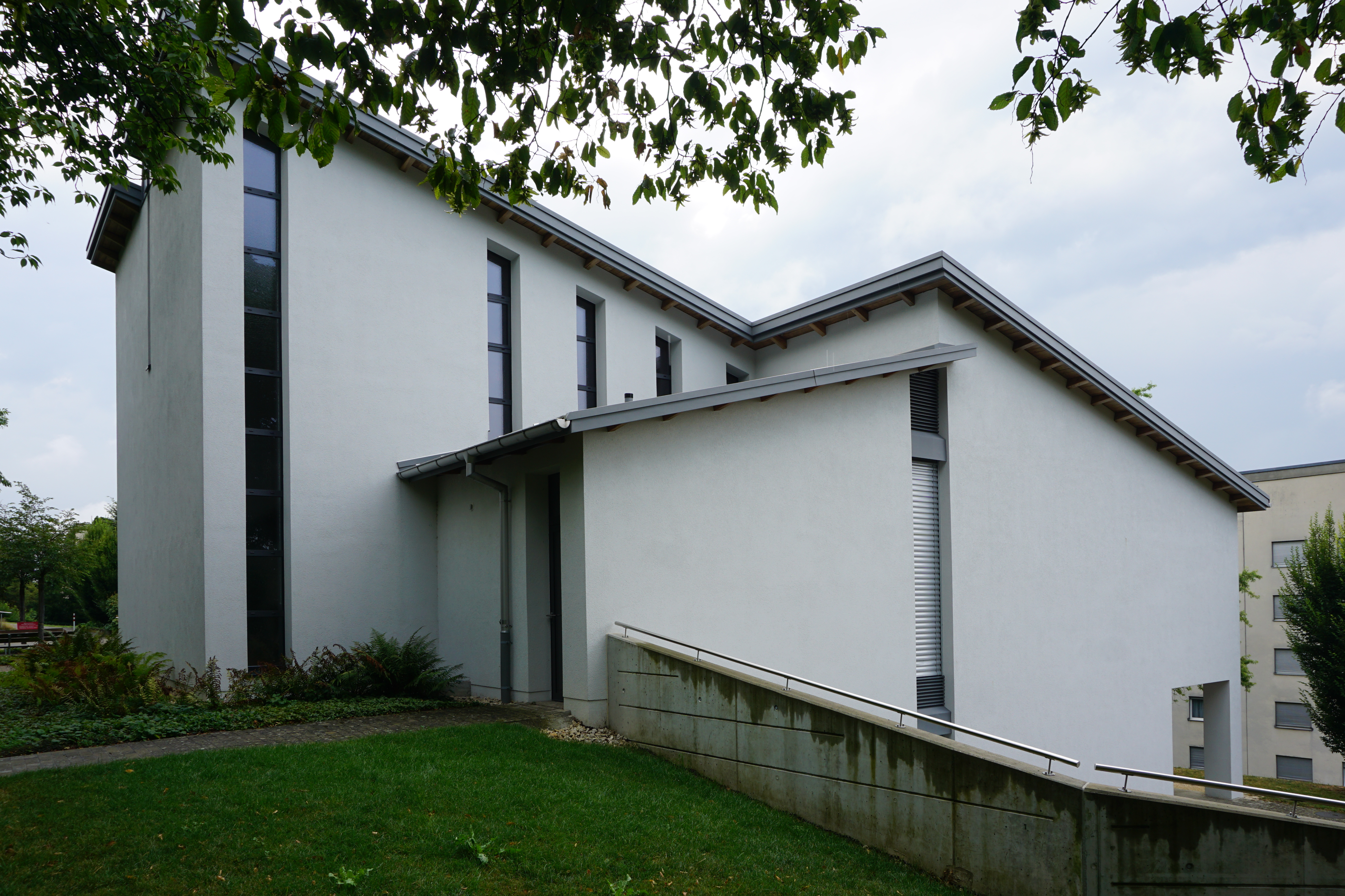 Westseite des Kirchenzentrums